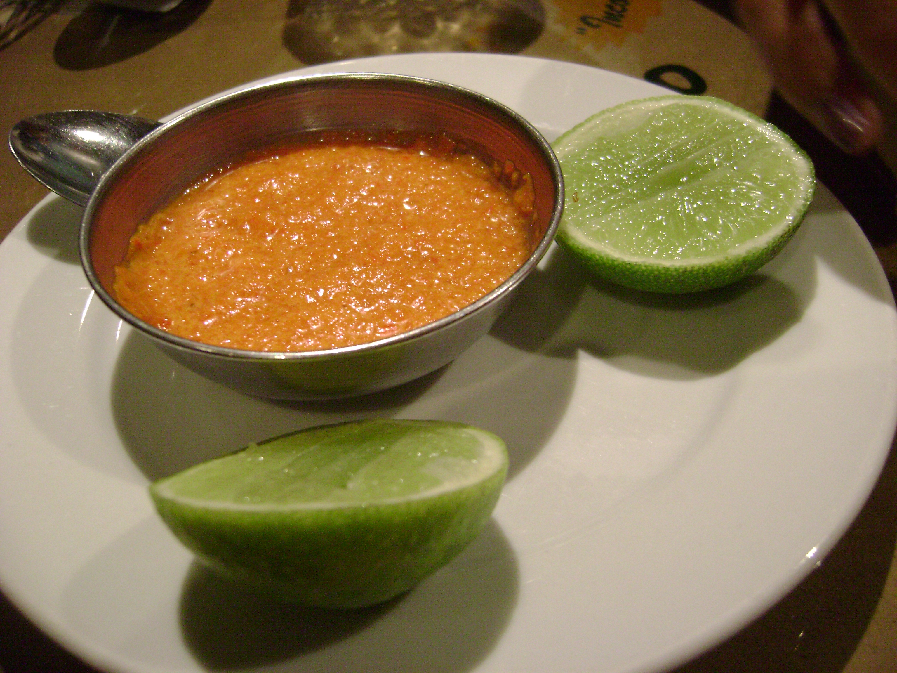 Salsa de ají y limón. Acompañamiento de muchas comidas en el Perú.